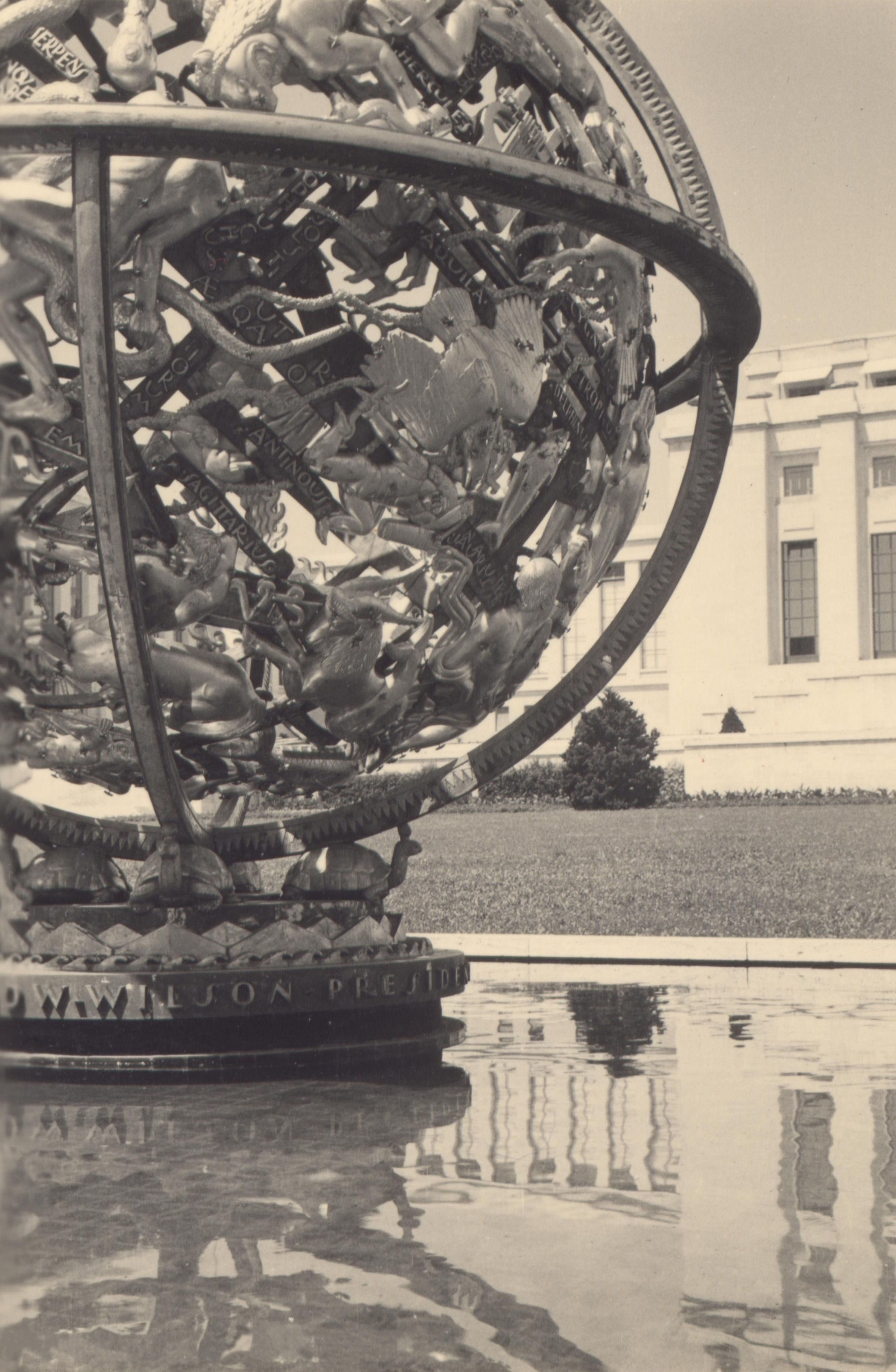 La sphère armillaire (Parc de l'Ariana, Palais des Nations, Genève) 1952